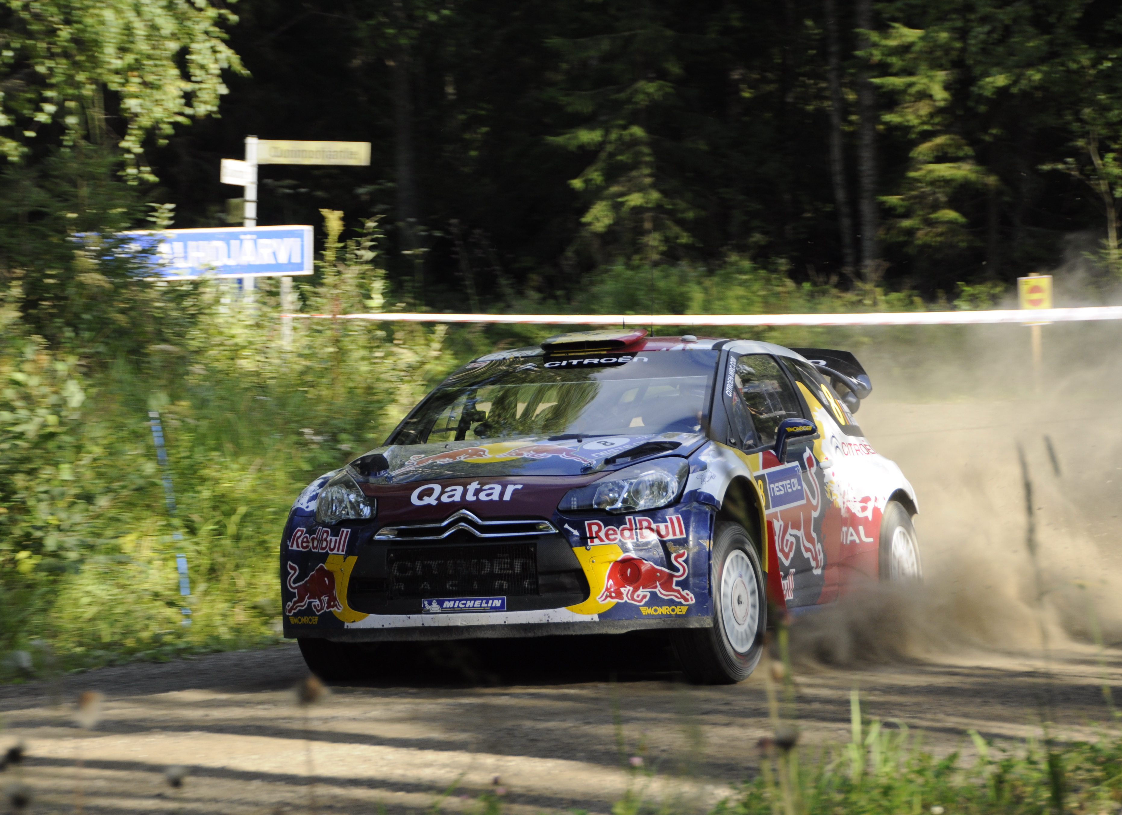 Rajd Finlandii 2012 Thierry Neuville jadący Citroenem DS3 WRC